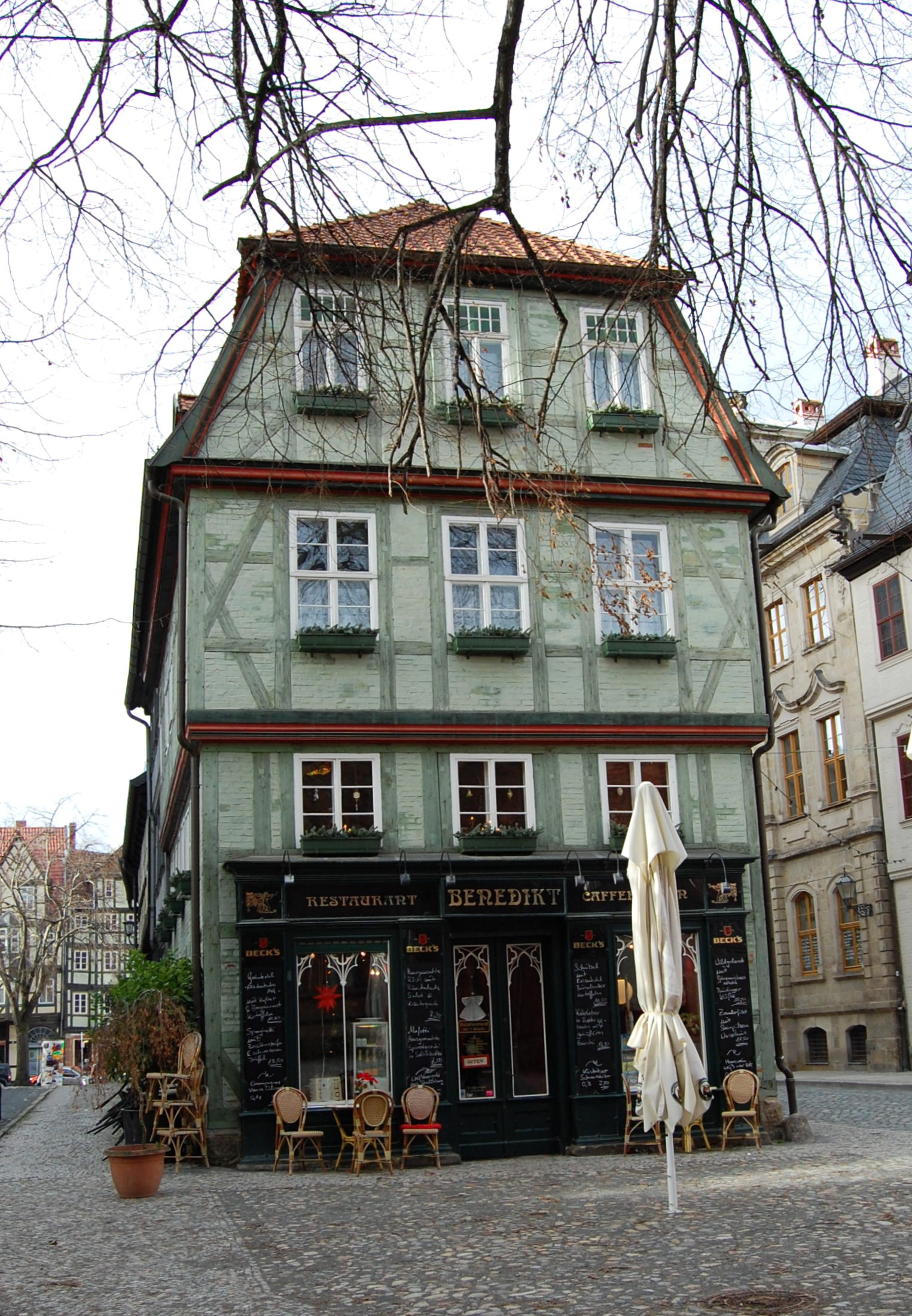 Haus Marktkirchhof 18 in Quedlinburg mit dem Restaurant Benedikt